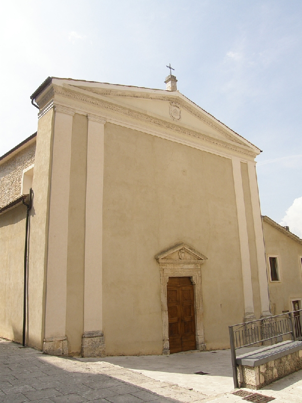 Caramanico Terme, chiesa della Santissima Trinità.